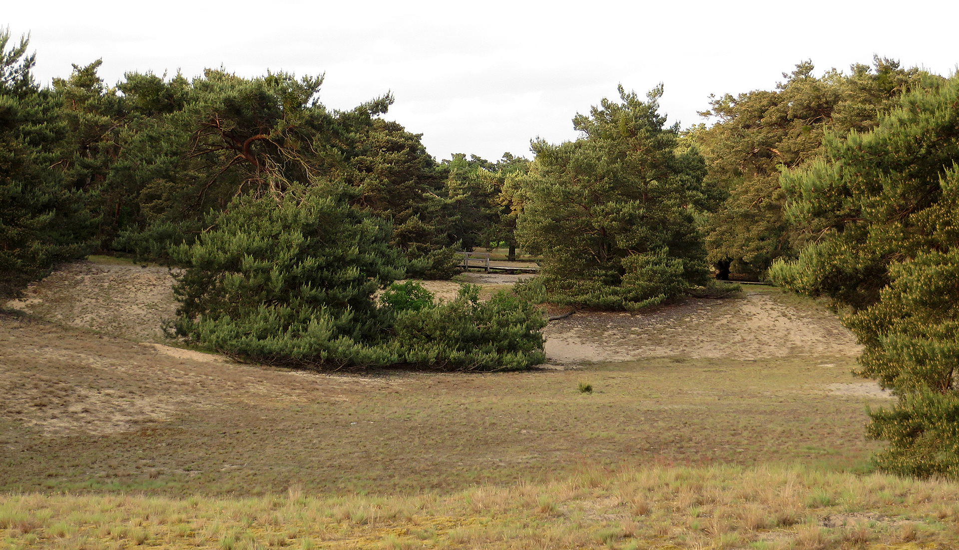 Naturschutzgebiet Schwanheimer Düne in Frankfurt, Sanddünen mit krummen Kiefern